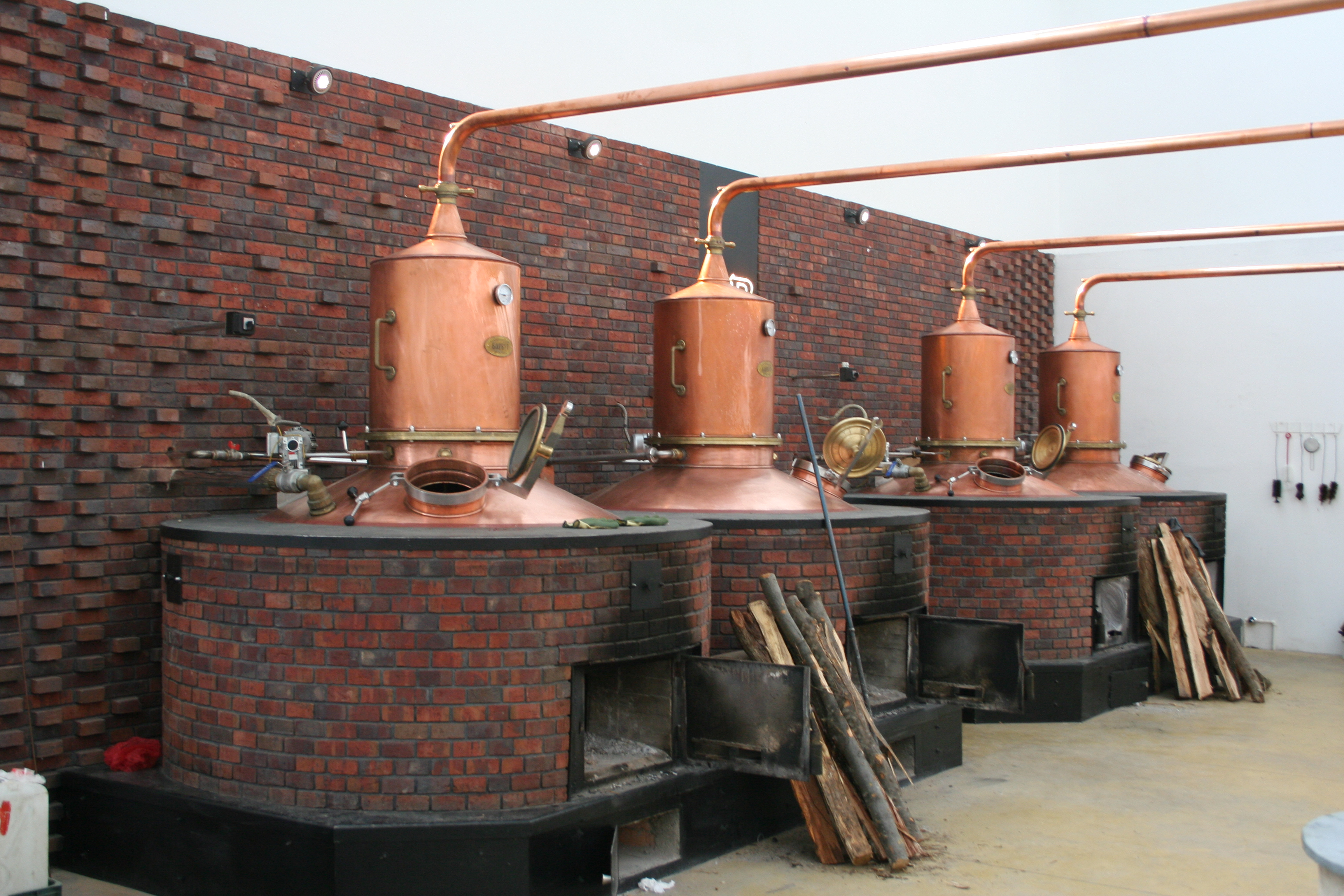 BB klekovača, Bajina Bašta